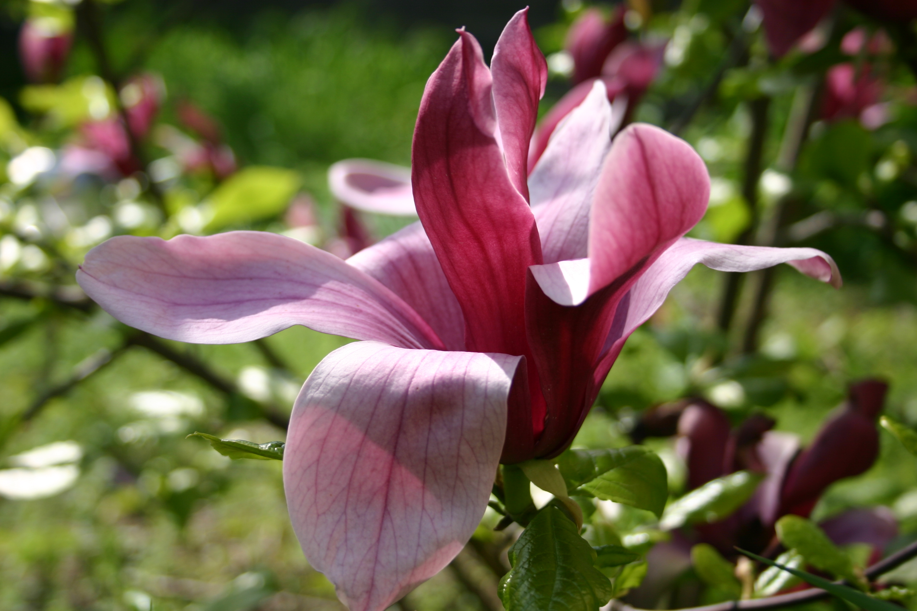 ©éréales Kille® [mailto:cerkil(at)free.fr